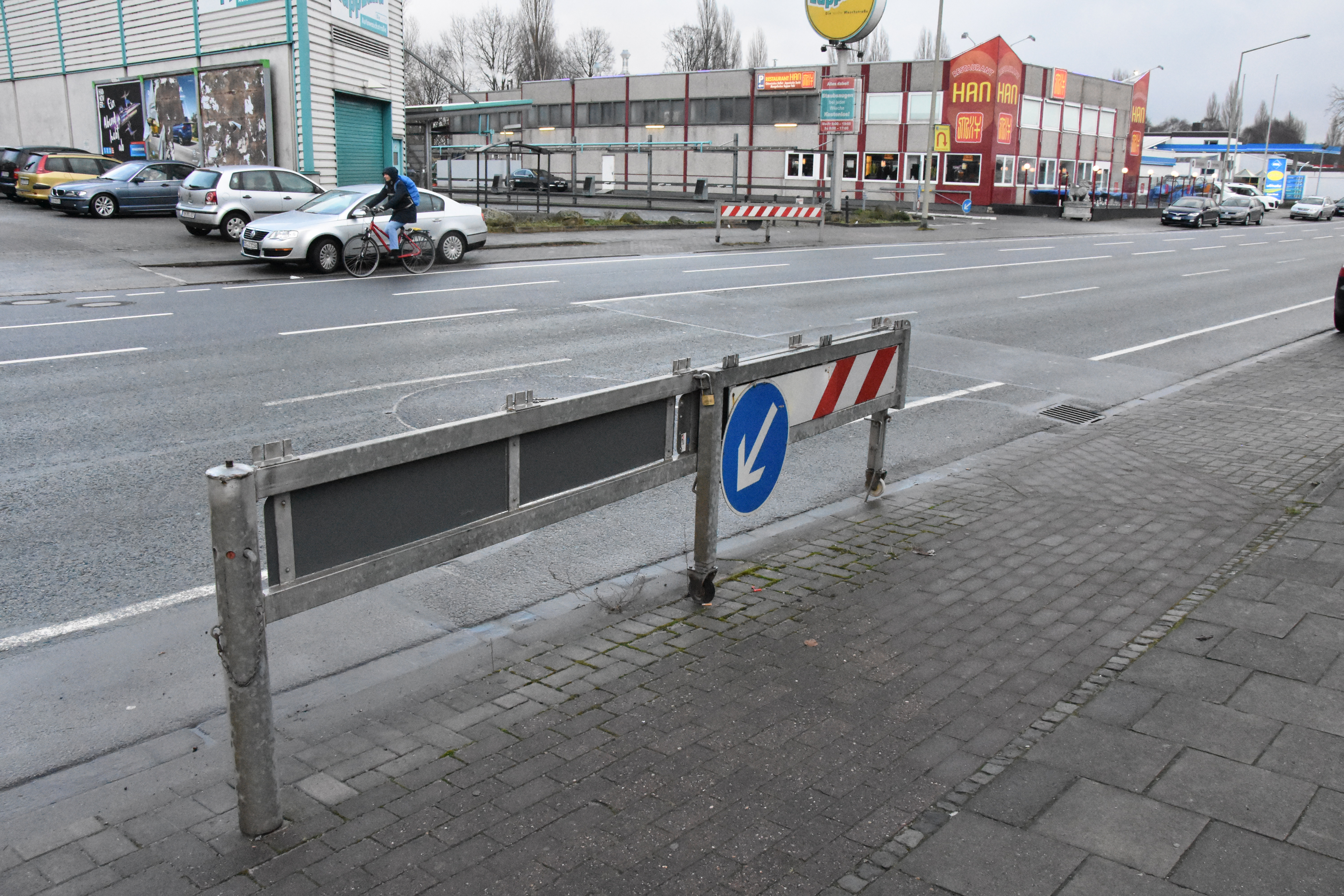 Sperre an der Pagenstecherstraße in Osnabrück